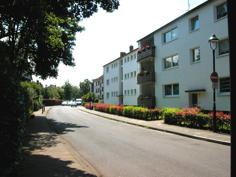 Die Straße «Balckestraße» in Benrath, Düsseldorf